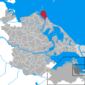 Peenemünde, Landkreis Ostvorpommern, Mecklenburg-Vorpommern